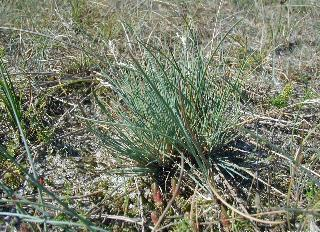 Nardus stricta}